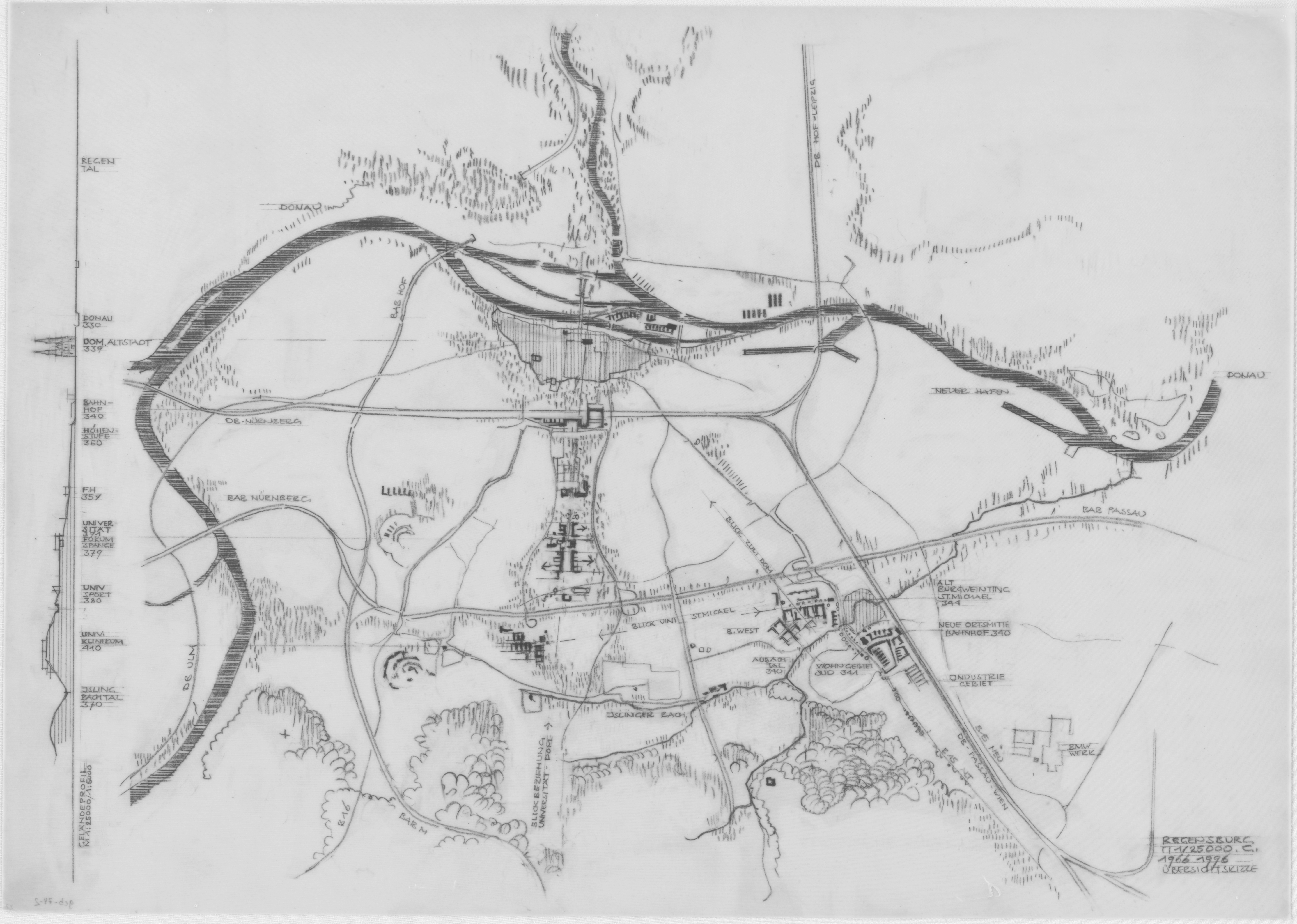 Gebhard, Helmut: Regensburg - Burgweinting (Bayern), 1992- 1996: Entwicklungsmaßnahme. Übersichtsskizze (Lageplan); Geländeprofil / Transparentpapier, Graphit / Bleistift. Signatur: geb-74-2